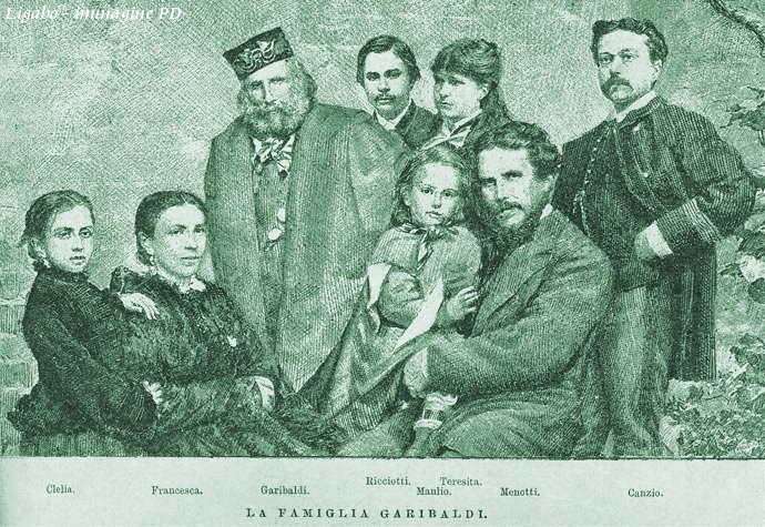 Ritratto della famiglia Garibaldi nel 1878, pubblicato nell'opera di Jessie Mario White "Garibaldi e i suoi tempi", edito da Treves a Milano nel 1884